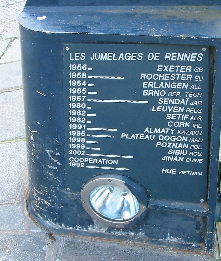 Rennes Nrf: Rennes